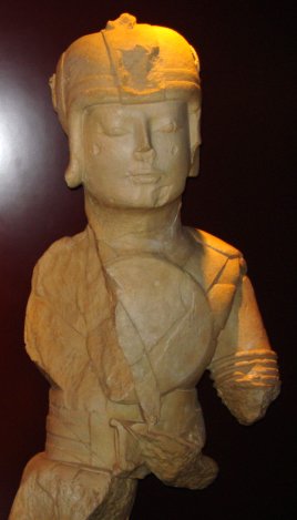 Guerrero llamado "de la doble armadura". Reproducción del hallazgo procedente del yacimiento arqueológico del Cerrillo Blanco (Porcuna, Jaén, España). Escultura ibérica del siglo V a. C. El original está esculpido en piedra arenisca blanca de grano fino conocida como "piedra de Santiago de Calatrava". El yacimiento fue hallado en 1975. Se expone en el Museo Arqueológico de Jaén. Representa a un guerrero aristocrático en combate.